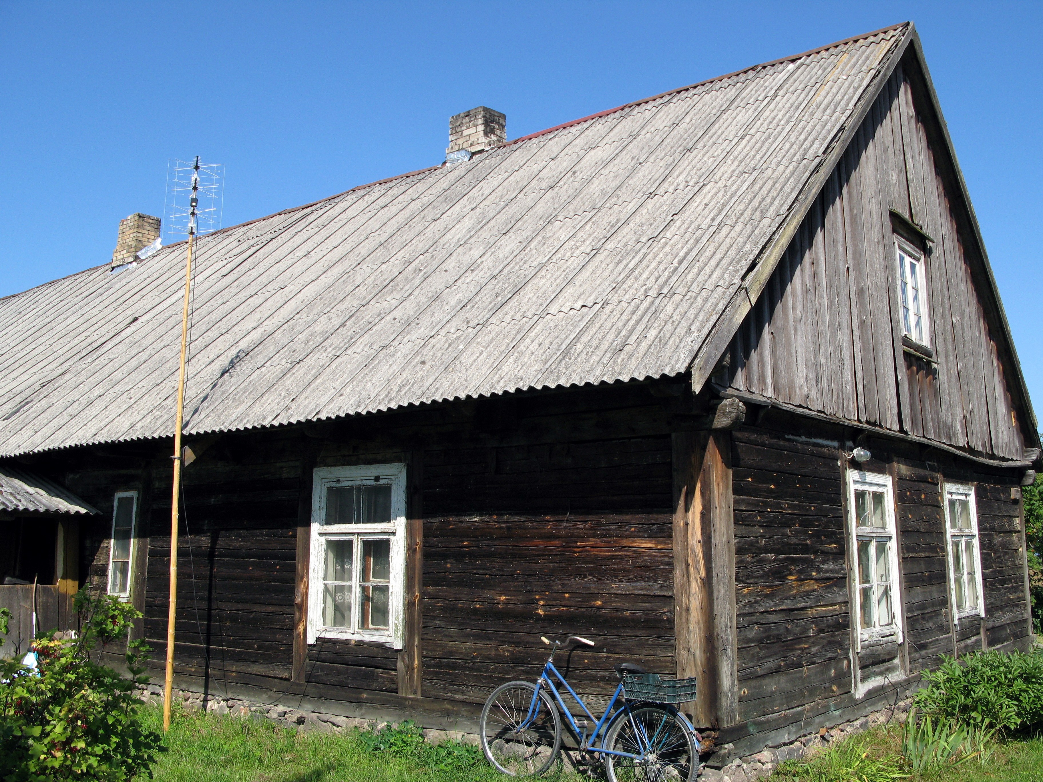 Pilsgali, Usmas ezers 2009.g. 8.augusts